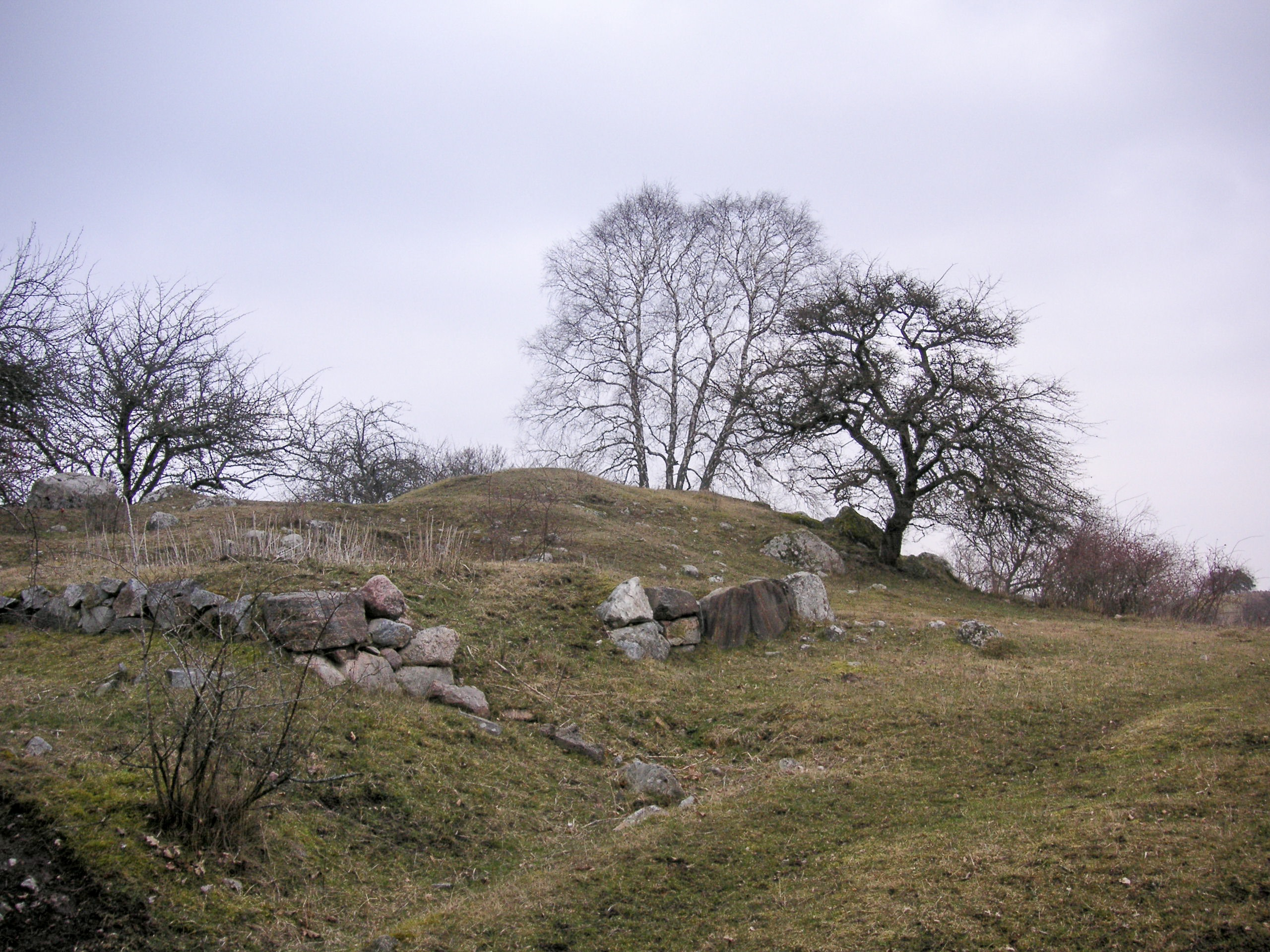 En av kungshögarna på Hovgården, Adelsön